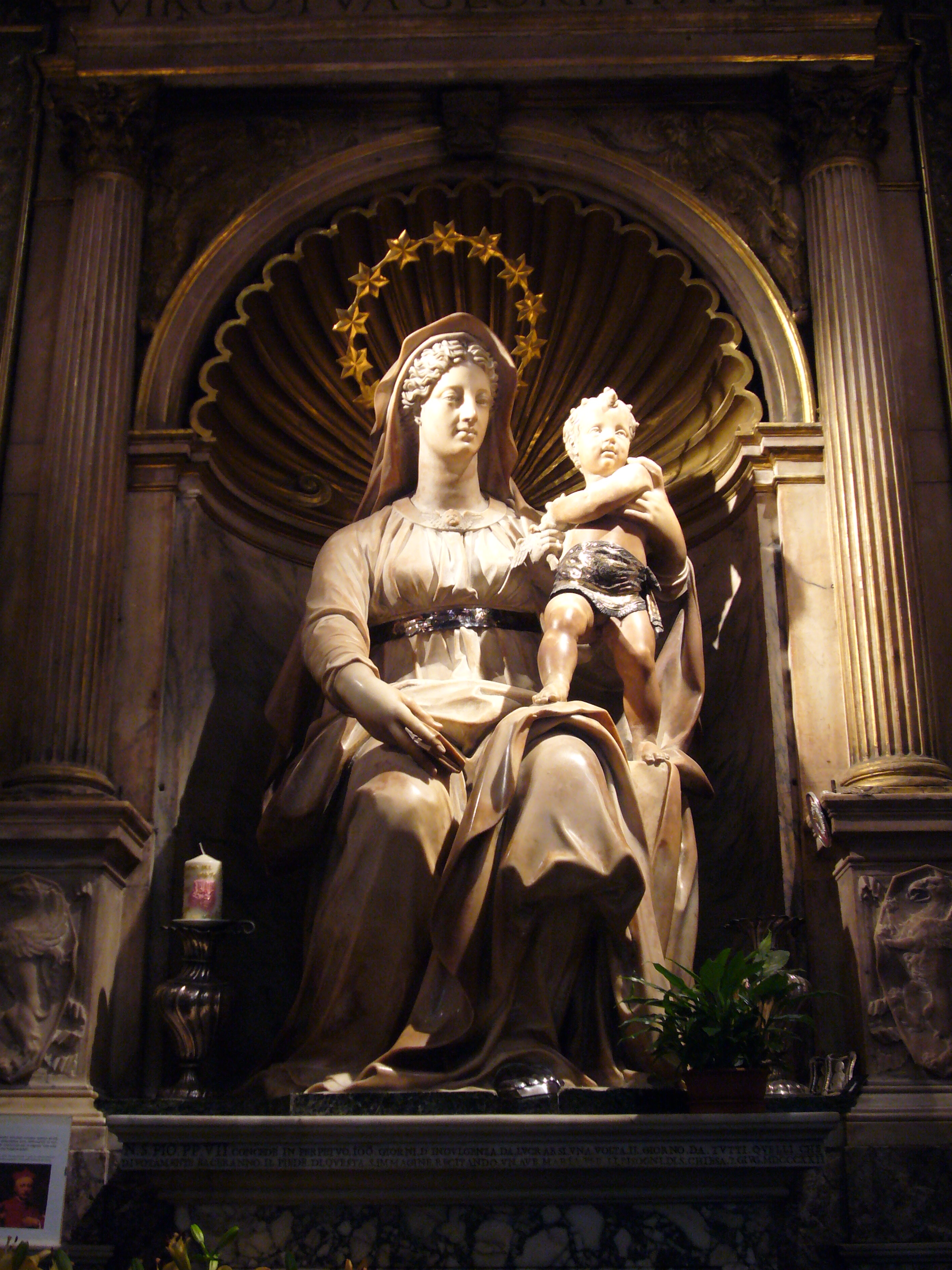 Roma, Sant'Agostino: Madonna del parto di Jacopo Sansovino